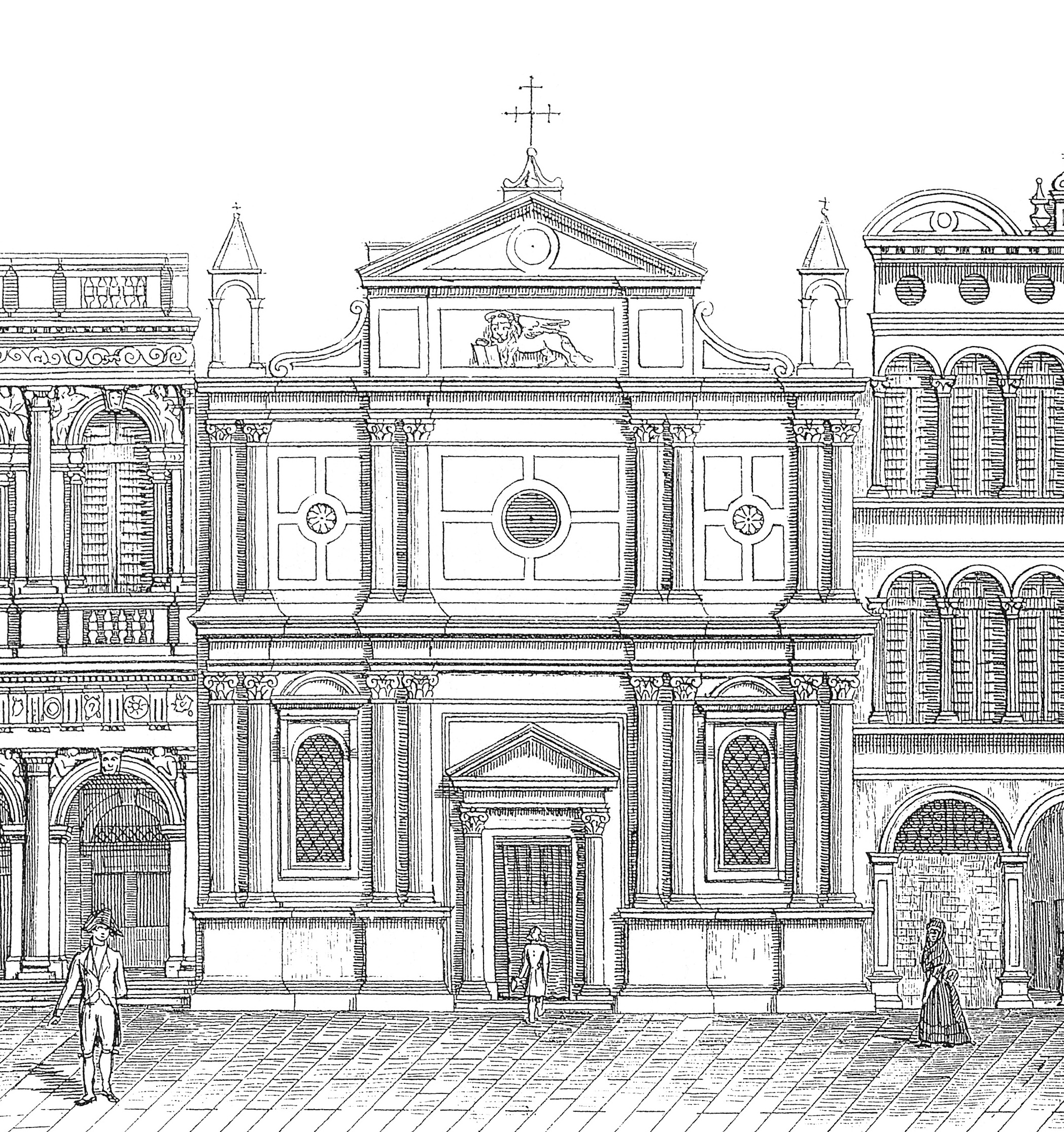 Ansicht der ehemaligen Kirche San Geminiano in Venedig